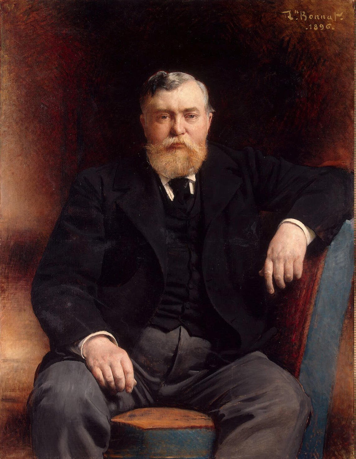 Prince Vyacheslav Nikolaevich Tenishev (1844–1903)